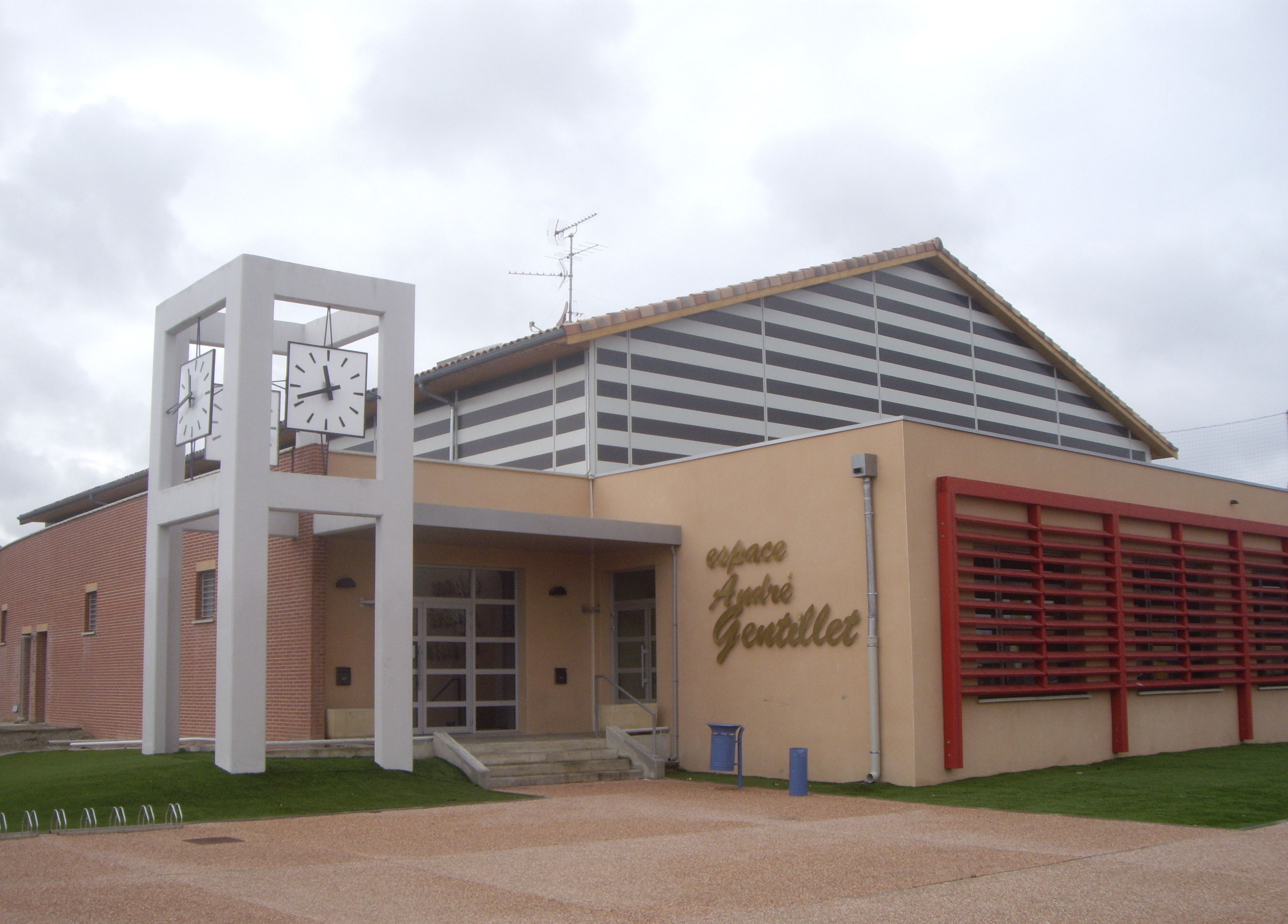 Fonbeauzard (Haute-Garonne, France) : espace André Gentillet - salle des fêtes.